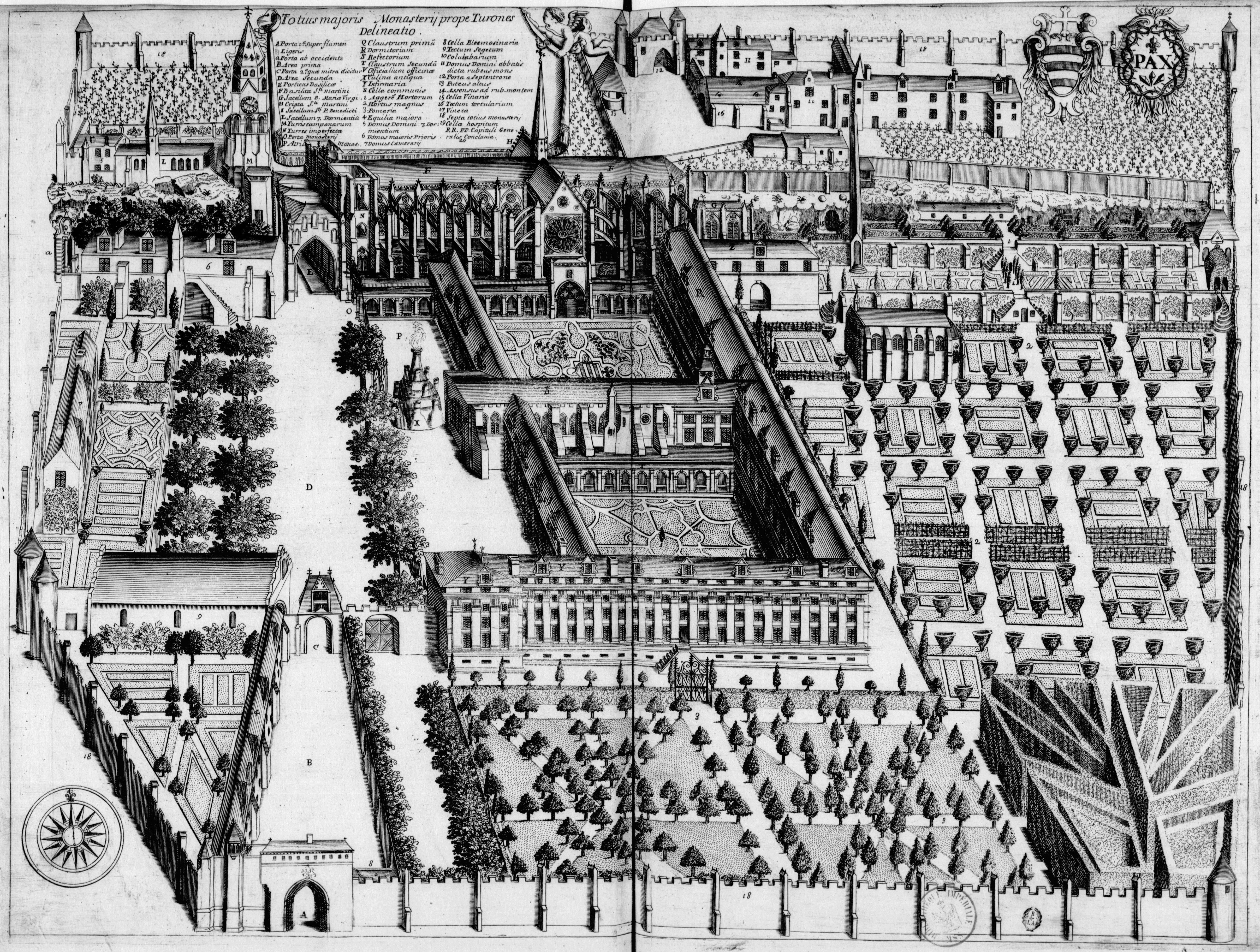 Planche gravée du 17ème siècle représentant l'abbaye Saint-Martin de Marmoutier, dans le livre Monasticon Gallicanum.